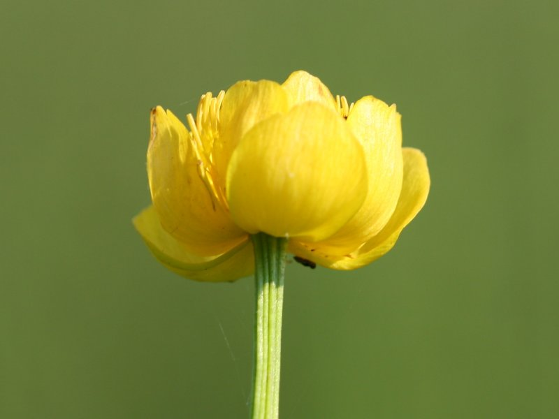 Trollblume (Trollius europaeus)